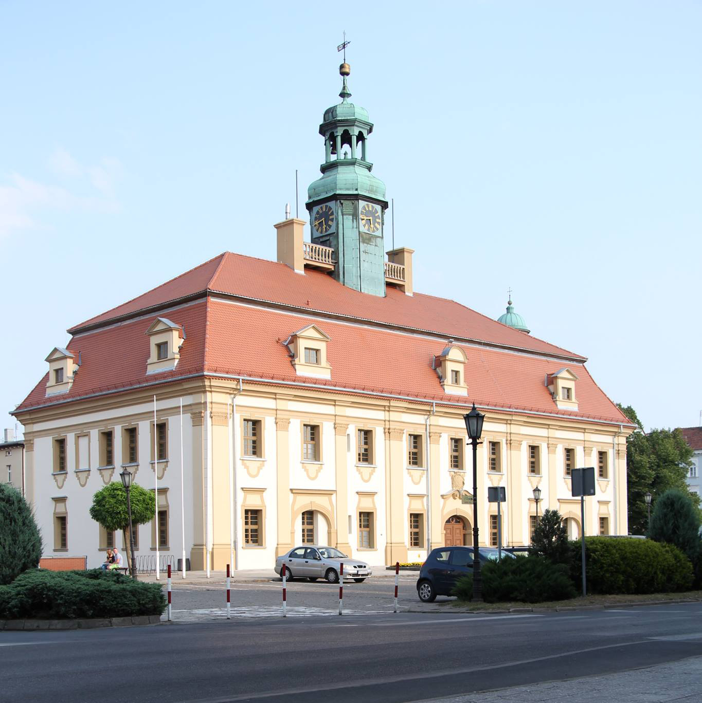 Rynek Rawicz